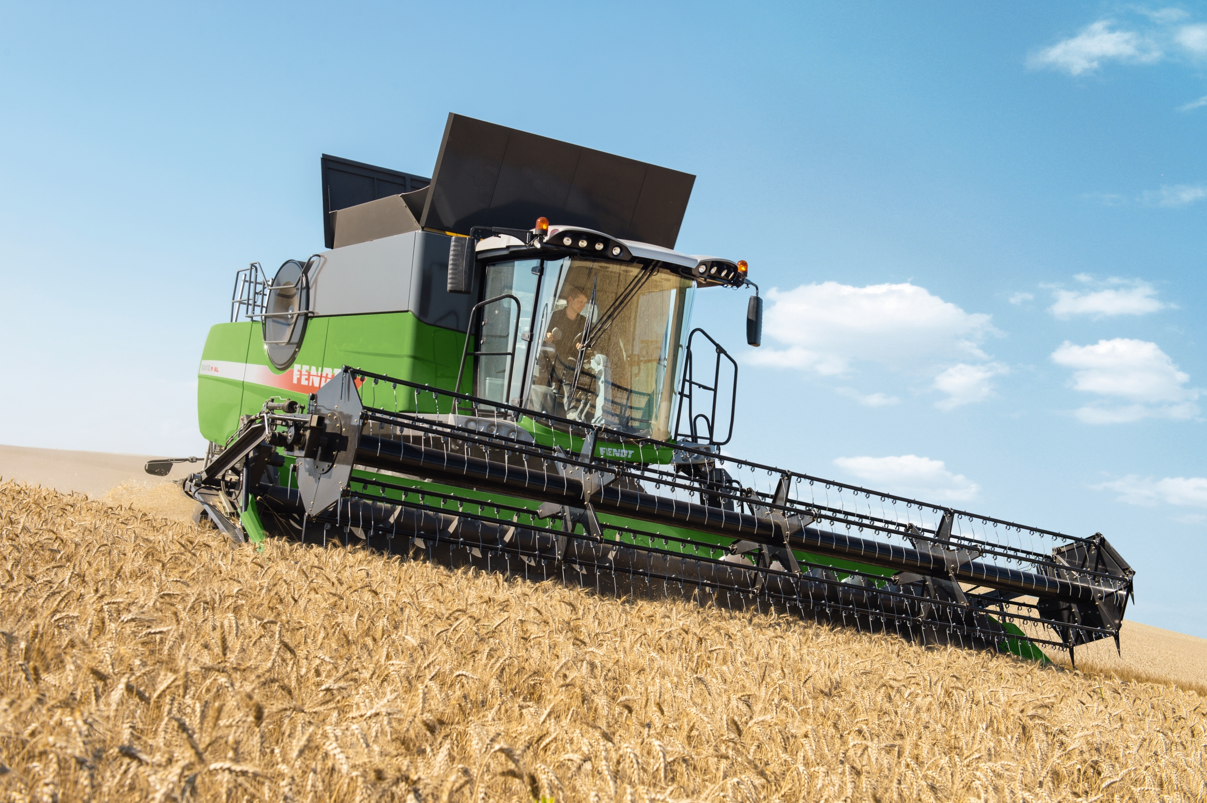 Fendt P-Serie